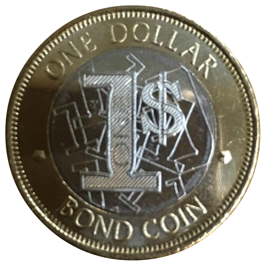 Zimbabwe USD1 bond coin 2016